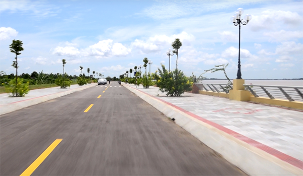 Bờ kè Thường Thới Tiền